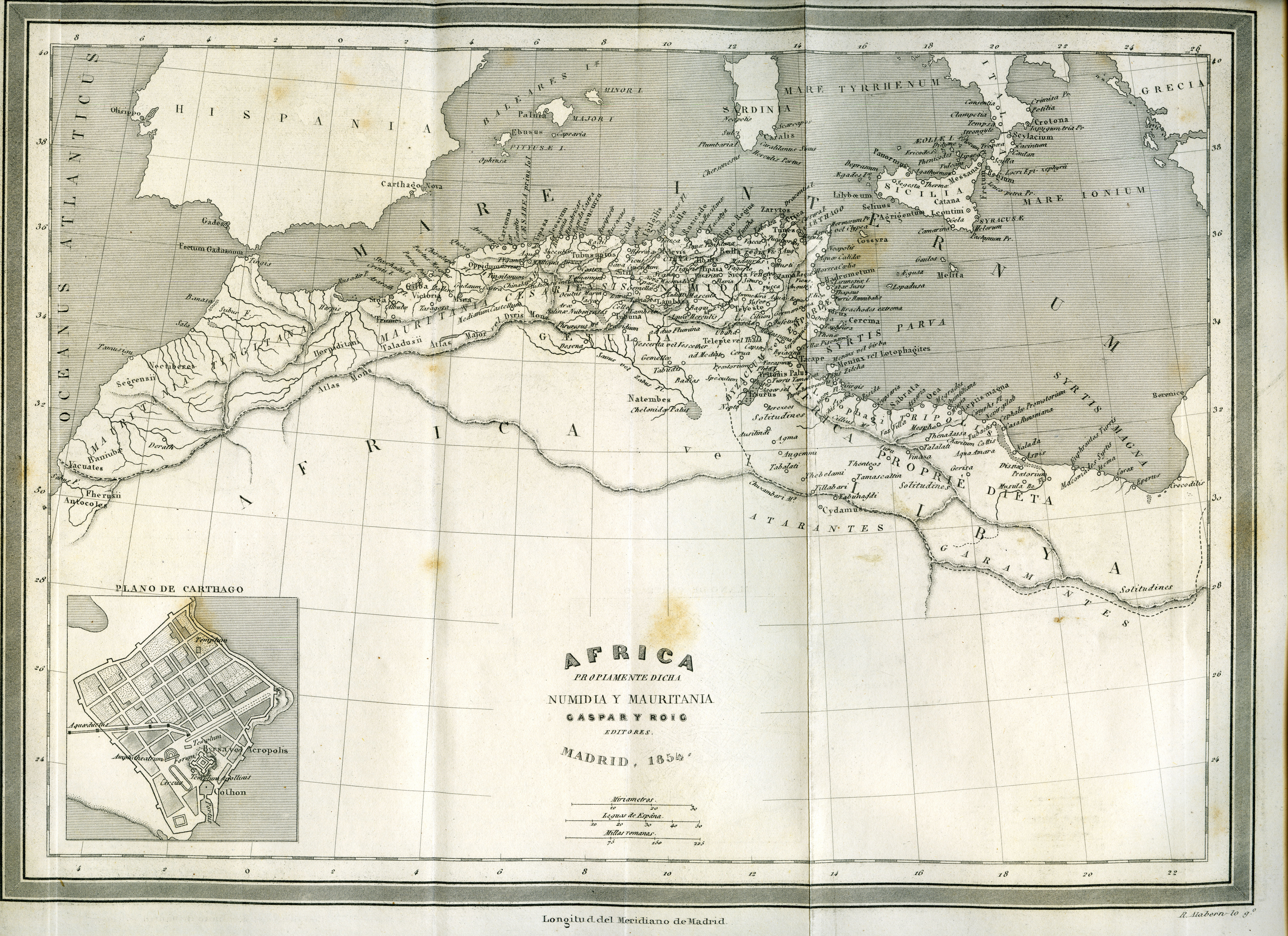 Ilustraciones pertenecientes al libro : Historia universal / por César Cantú ; traducida del italiano con arreglo a la 7a ed. de Turín, anotada por Nemesio Fernández Cuesta. - Madrid : Imprenta de Gaspar y Roig, 1854-1859